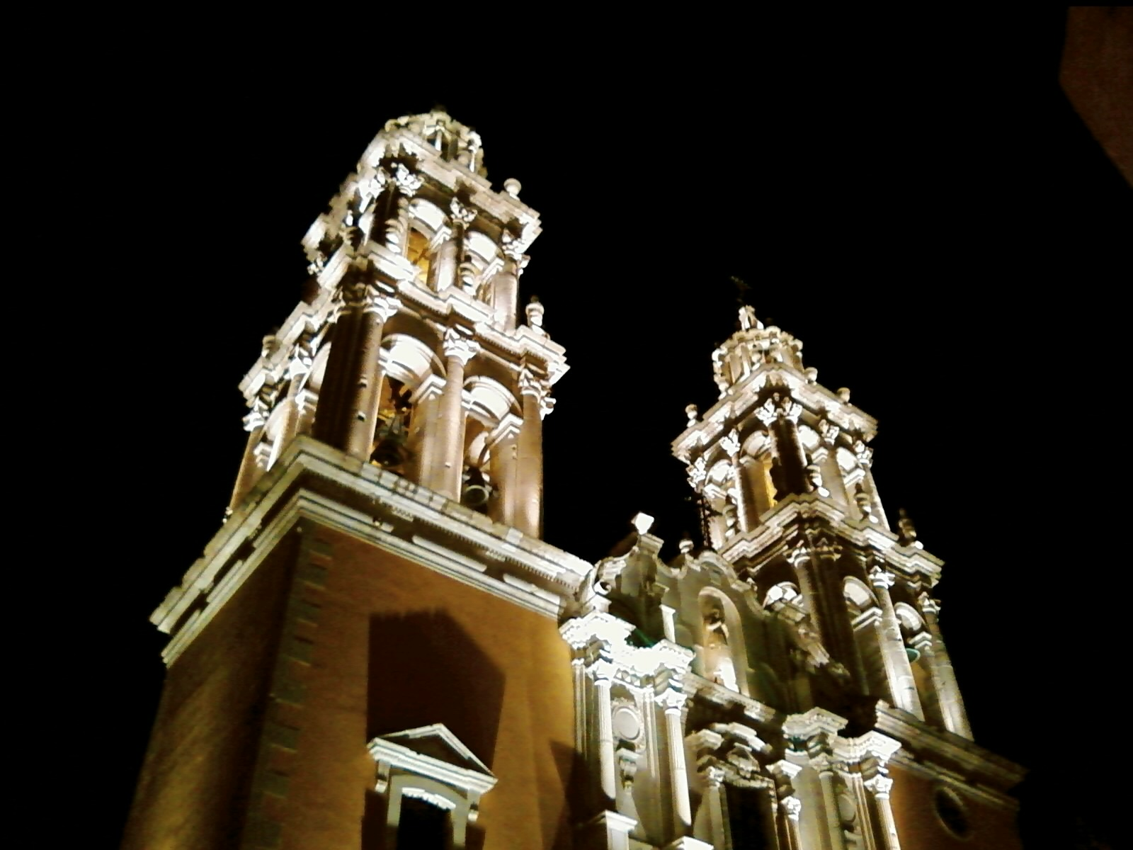 Santuario de Nuestra Señora de la Soledad, Jerez, Zacatecas